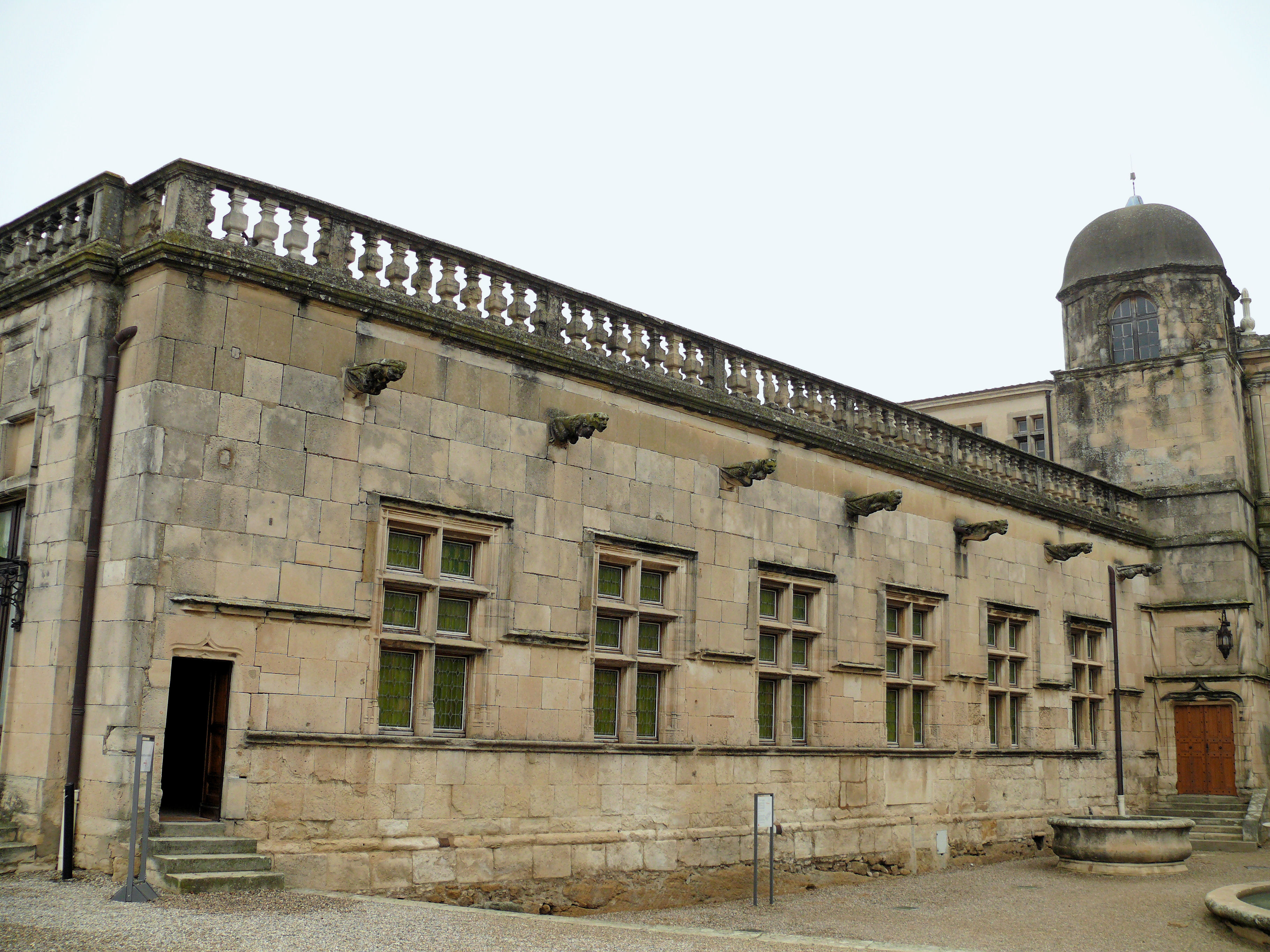 Château de Grignan - Galerie des Adhémar sur la cour du puits